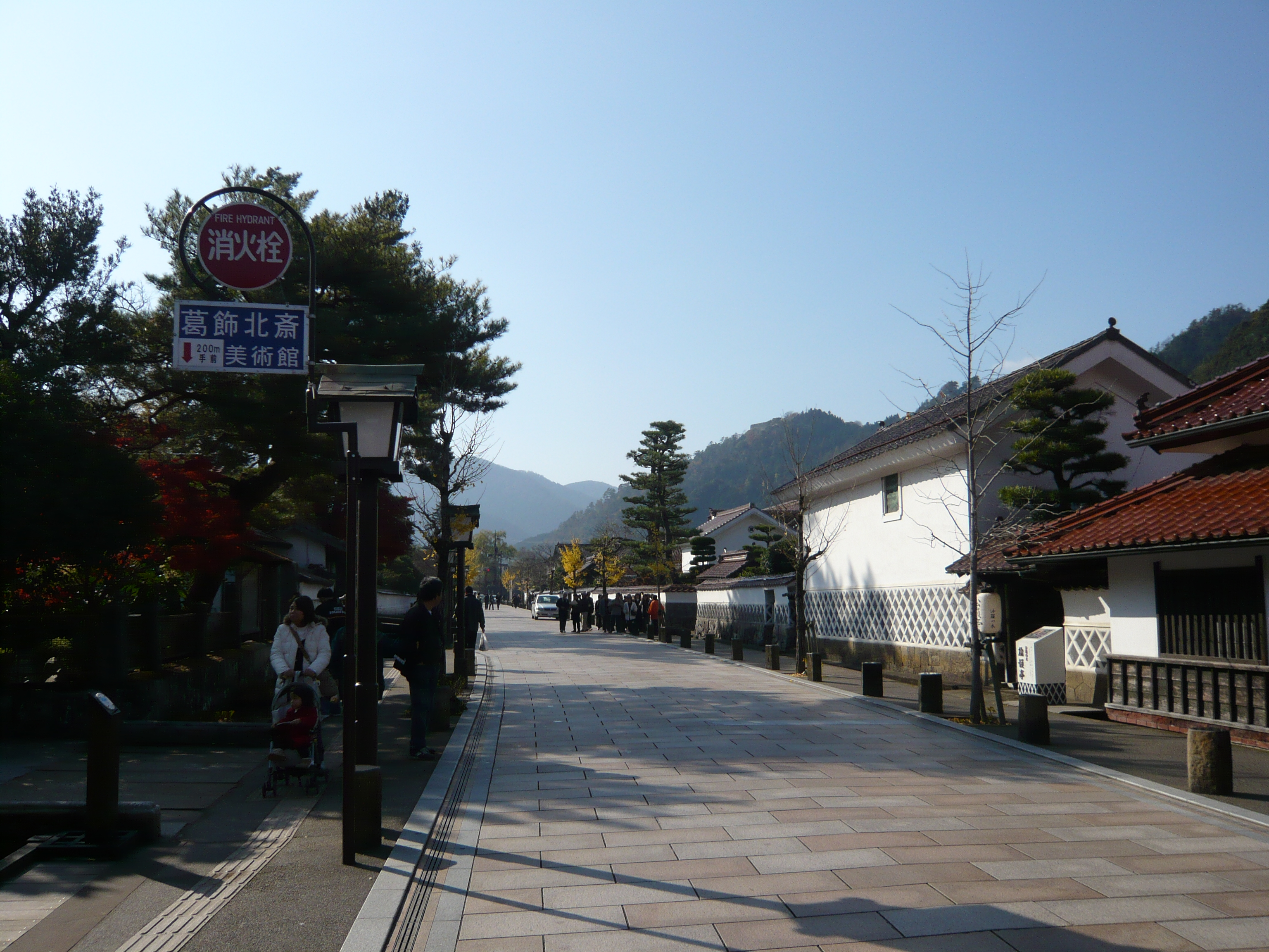 津和野の町並み